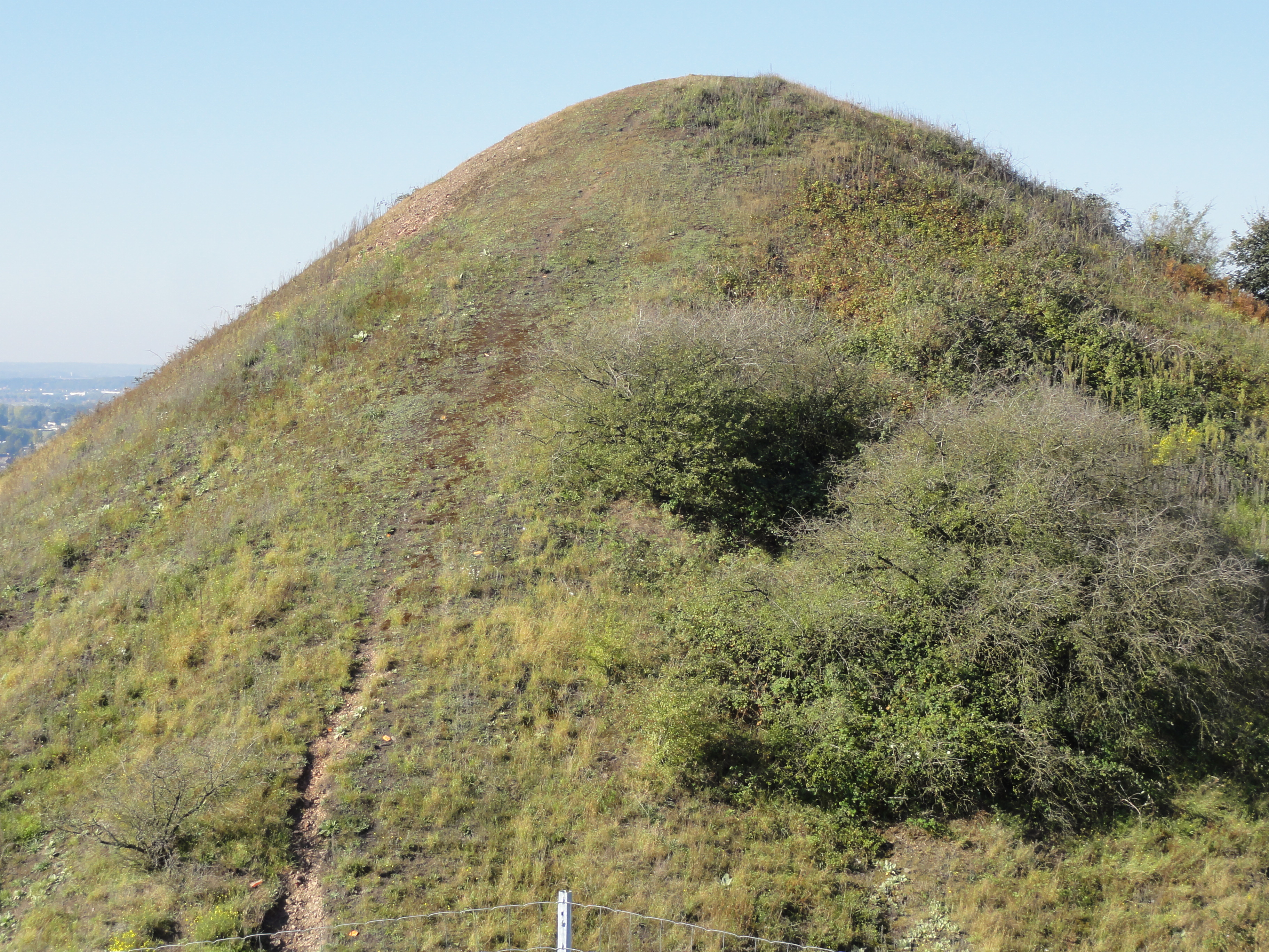 Terril n° 84 dit 2 Sud de Drocourt, fosse n° 2 de la Compagnie des mines de Drocourt dans le bassin minier du Nord-Pas-de-Calais, Rouvroy, Pas-de-Calais, Nord-Pas-de-Calais, France. Le terril no 84 est inscrit sur la liste du patrimoine mondial de l'Unesco le 30 juin 2012 et y constitue en partie le site no 48.